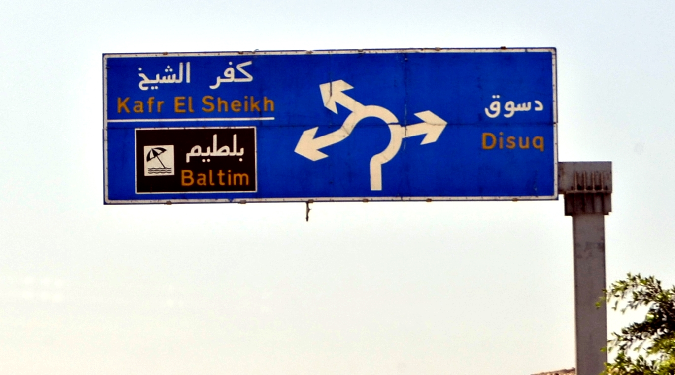 لافتة إرشادية، مدينة كفر الشيخ، مصر